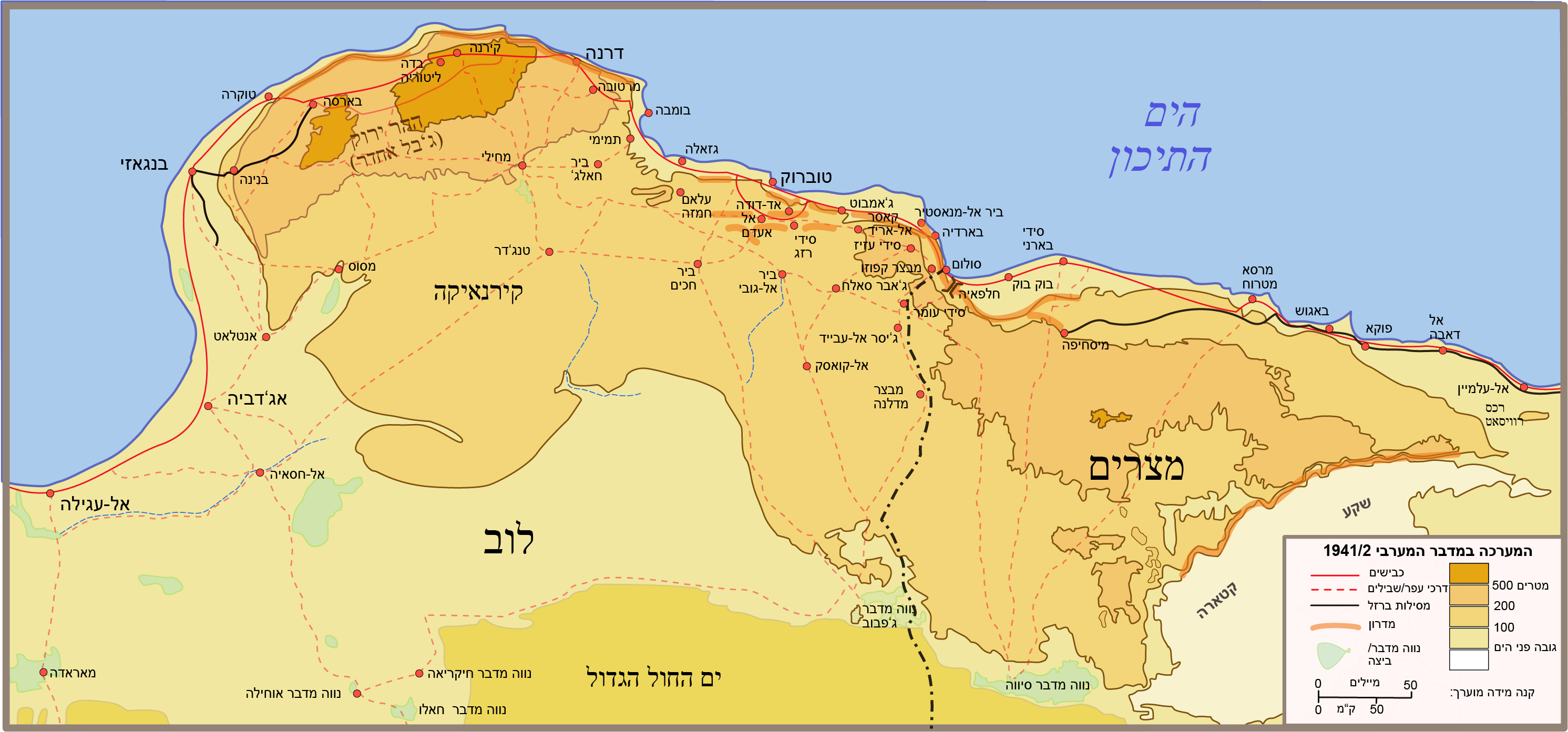 המערכה במדבר המערבי, 1941-2.